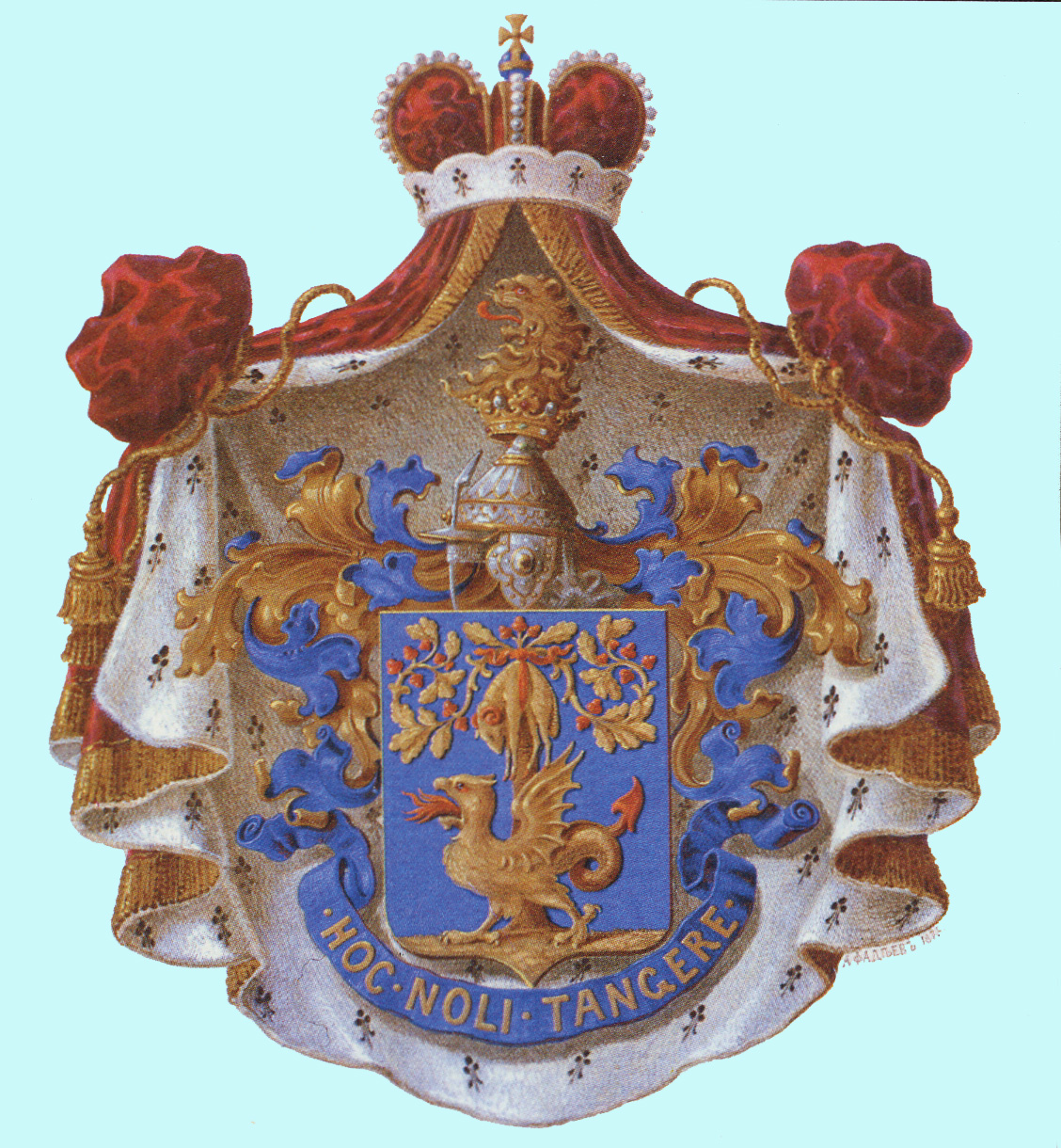 герб светлейшего князя Мингрельского